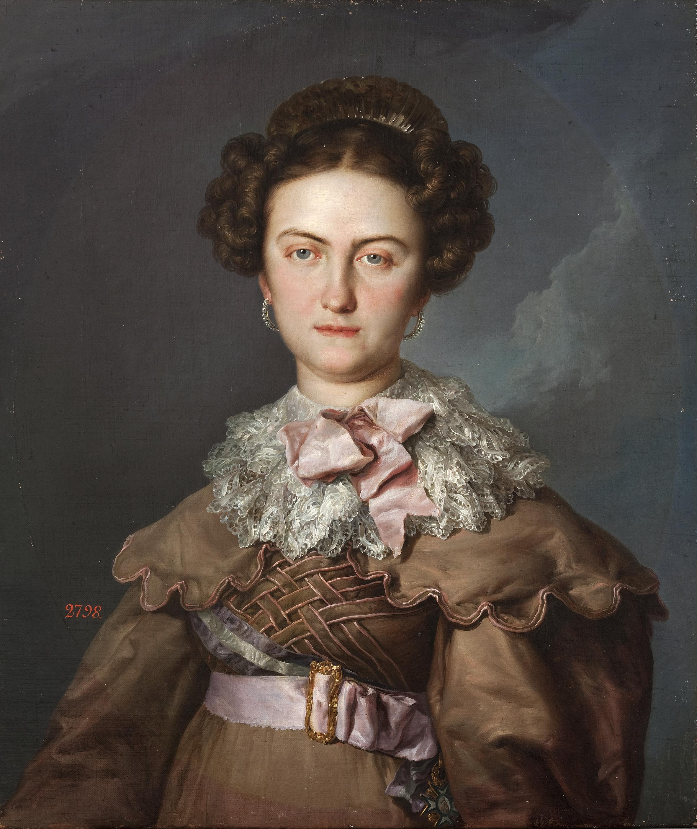 Retrato de María Amalia de Sajonia (1803-1829), que fue reina consorte de España por su matrimonio con Fernando VII, de quien fue la tercera esposa, y que era hija del príncipe Maximiliano de Sajonia y de la princesa Carolina de Borbón-Parma. La reina lleva el pelo sujeto con una peineta de carey y tiene bucles a ambos lados de su frente, luciendo además la banda y la cruz de la Orden de las Damas Nobles de la Reina María Luisa. El estilo del retrato y el aspecto maduro de la reina han llevado a algunos autores a afirmar que debió ser pintado hacia el año 1828, un año antes de la muerte de la soberana, y cuando tenía 23 años.